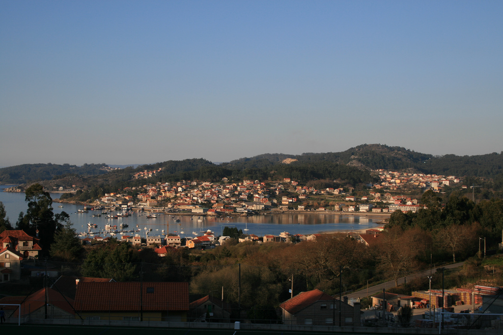 Vista de la parroquia de Aldán desde O Hío